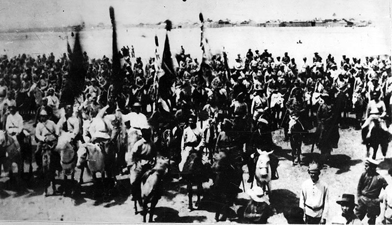 Монгол: Монгол Ардын Журамт цэрэг Нийслэл хүрээнд орж ирж буй нь.